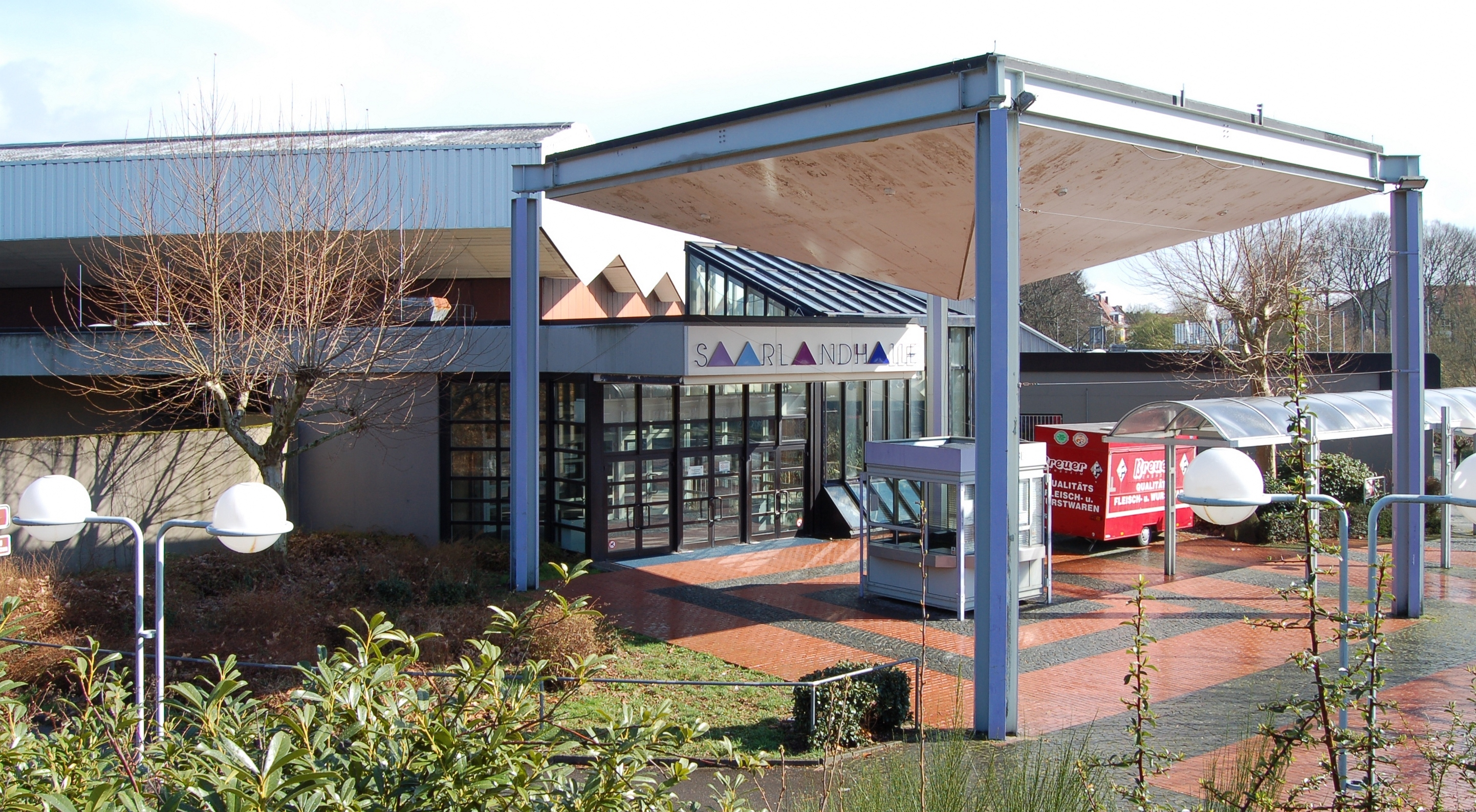 Der Eingang der Saarlandhalle auf dem Rodenhof (Malstatt), einem Stadtteil von Saarbrücken.